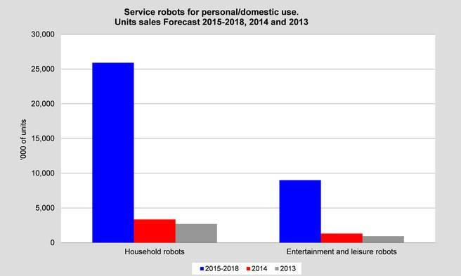 From IFR